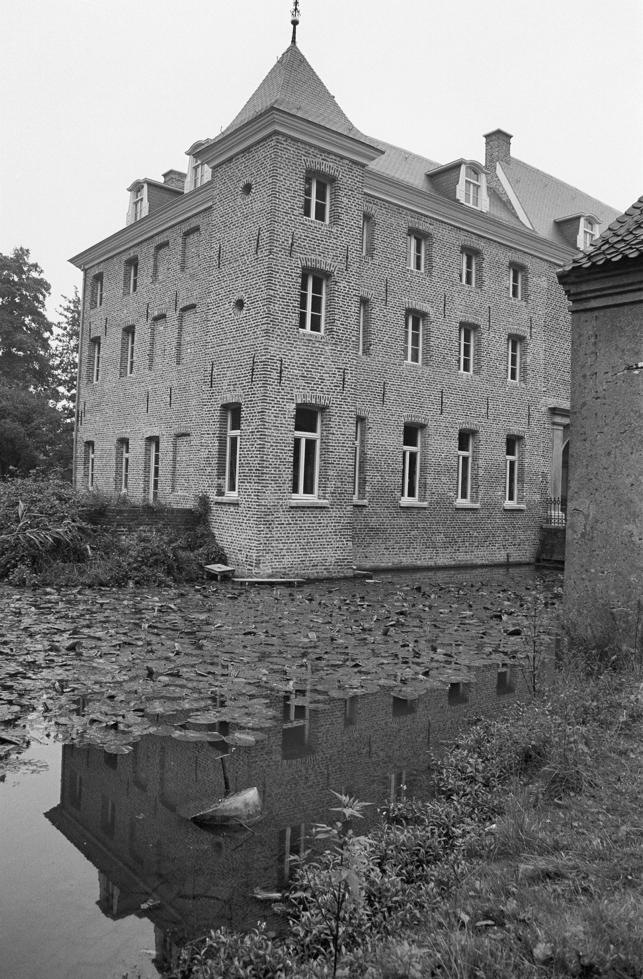 Kasteel Holtmuhle: Exterieur GEDEELTE VOORGEVEL, ZIJGEVEL